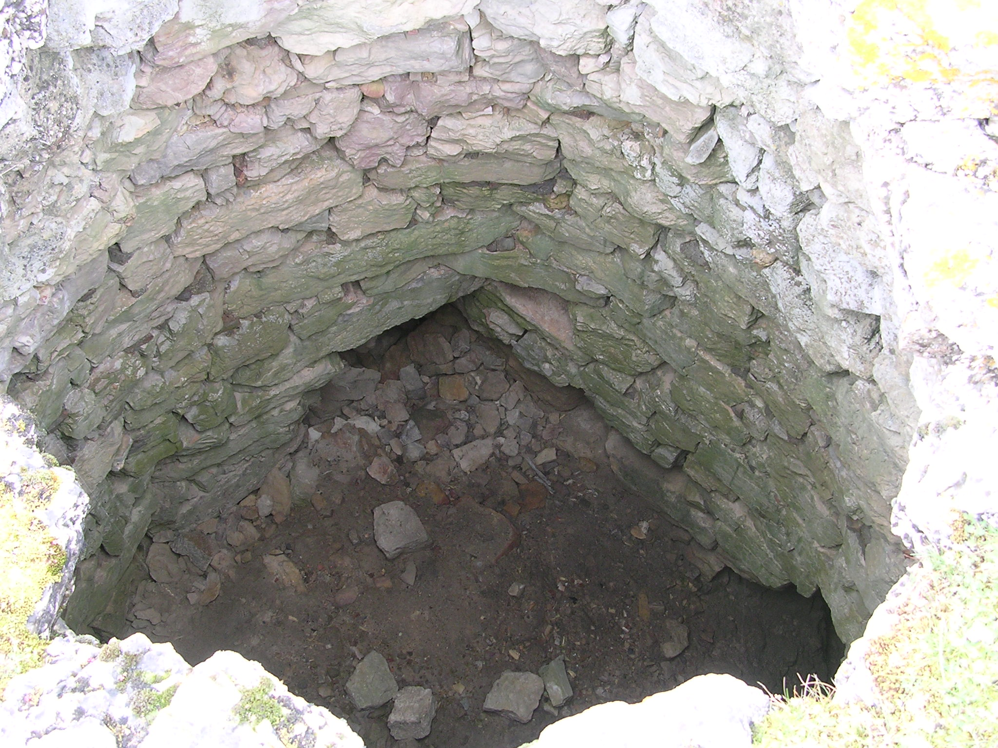 Interno del Nuraghe s'Ulimu, si nota l'ingresso e parte della nicchia interna